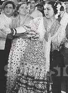 María del Pilar Lebrón- actriz y cantante